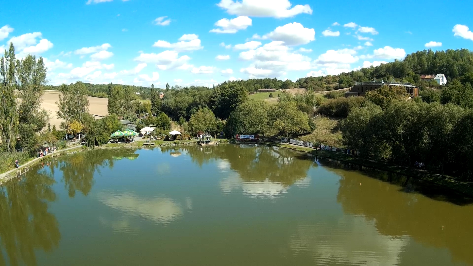 Soubor 5 rybníků s přírodní samočistící schopností